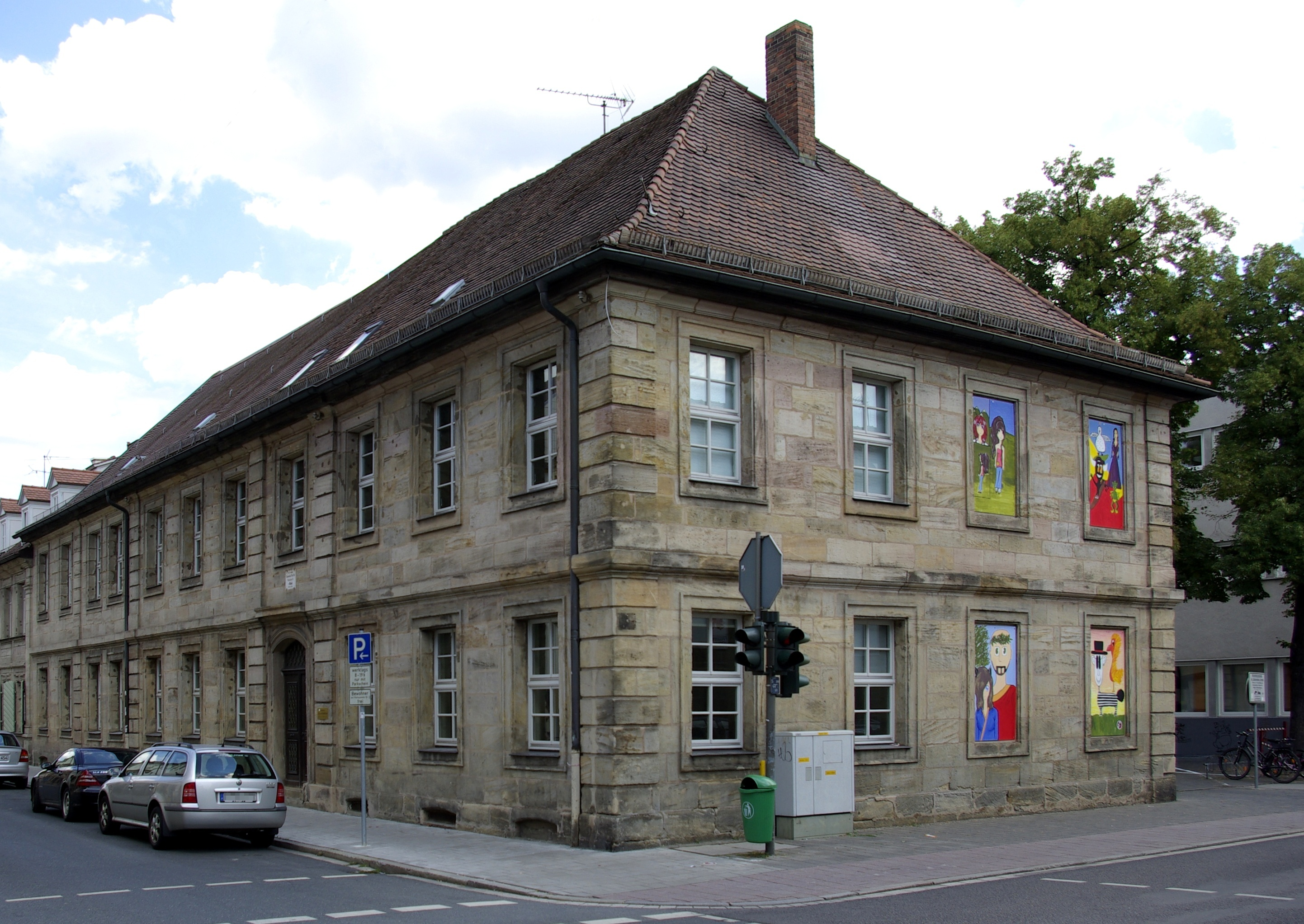 Lynckersches Palais in der Friedrichstraße 35 in Erlangen.